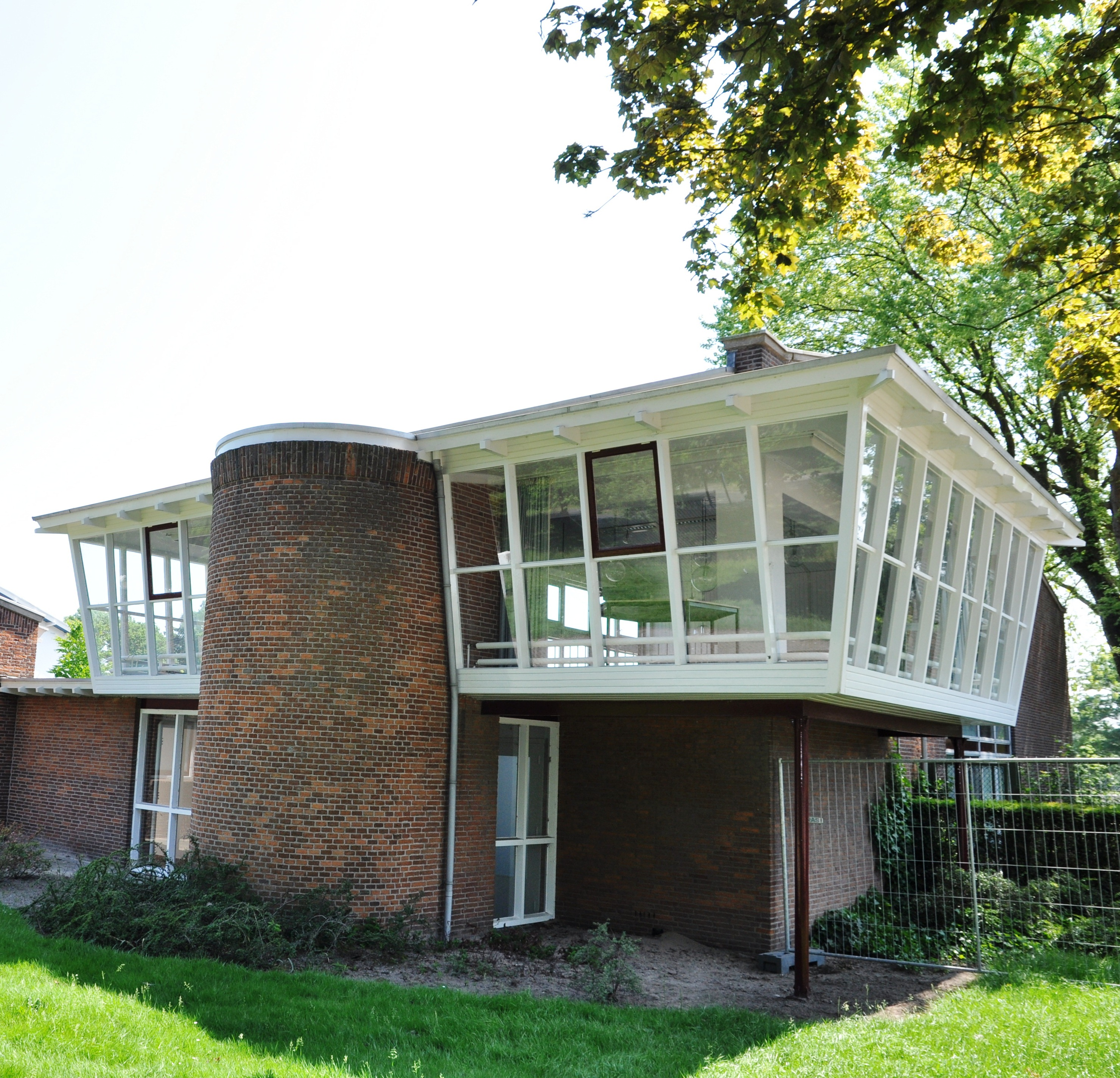 Ontspanningscentrum De Boô in Schoonebeek is een ontwerp van architect Arno Nicolai.